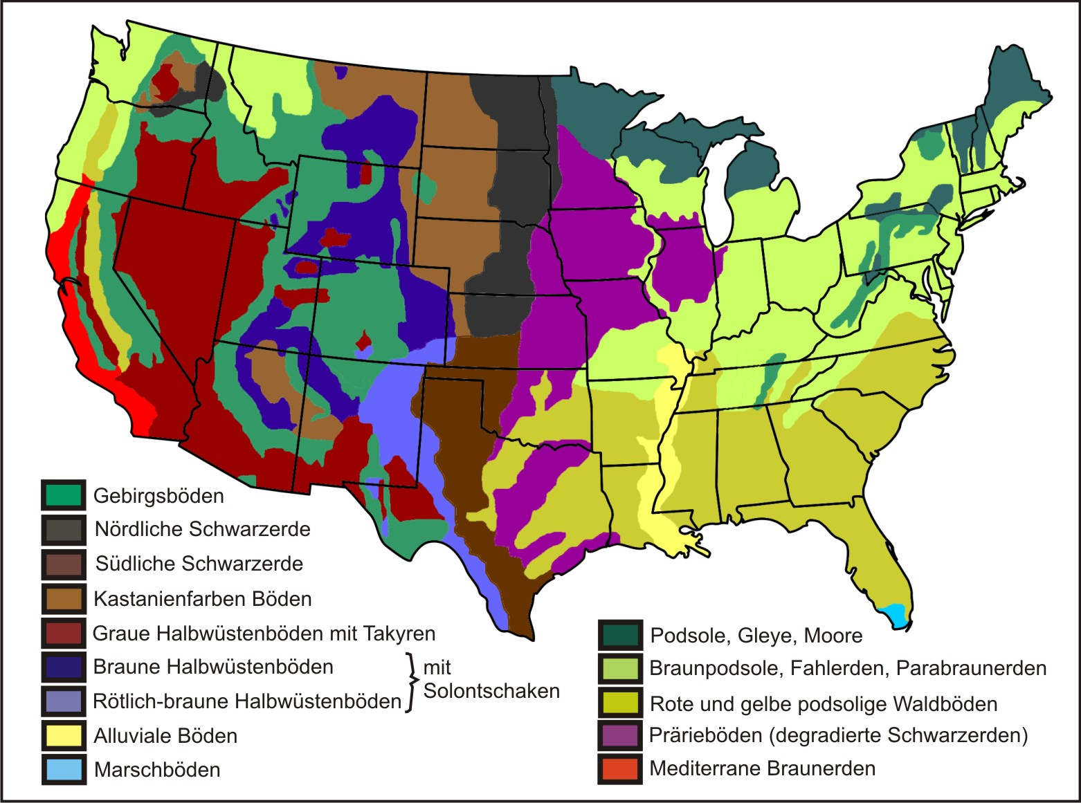 Hauptbodentypen in den USA.